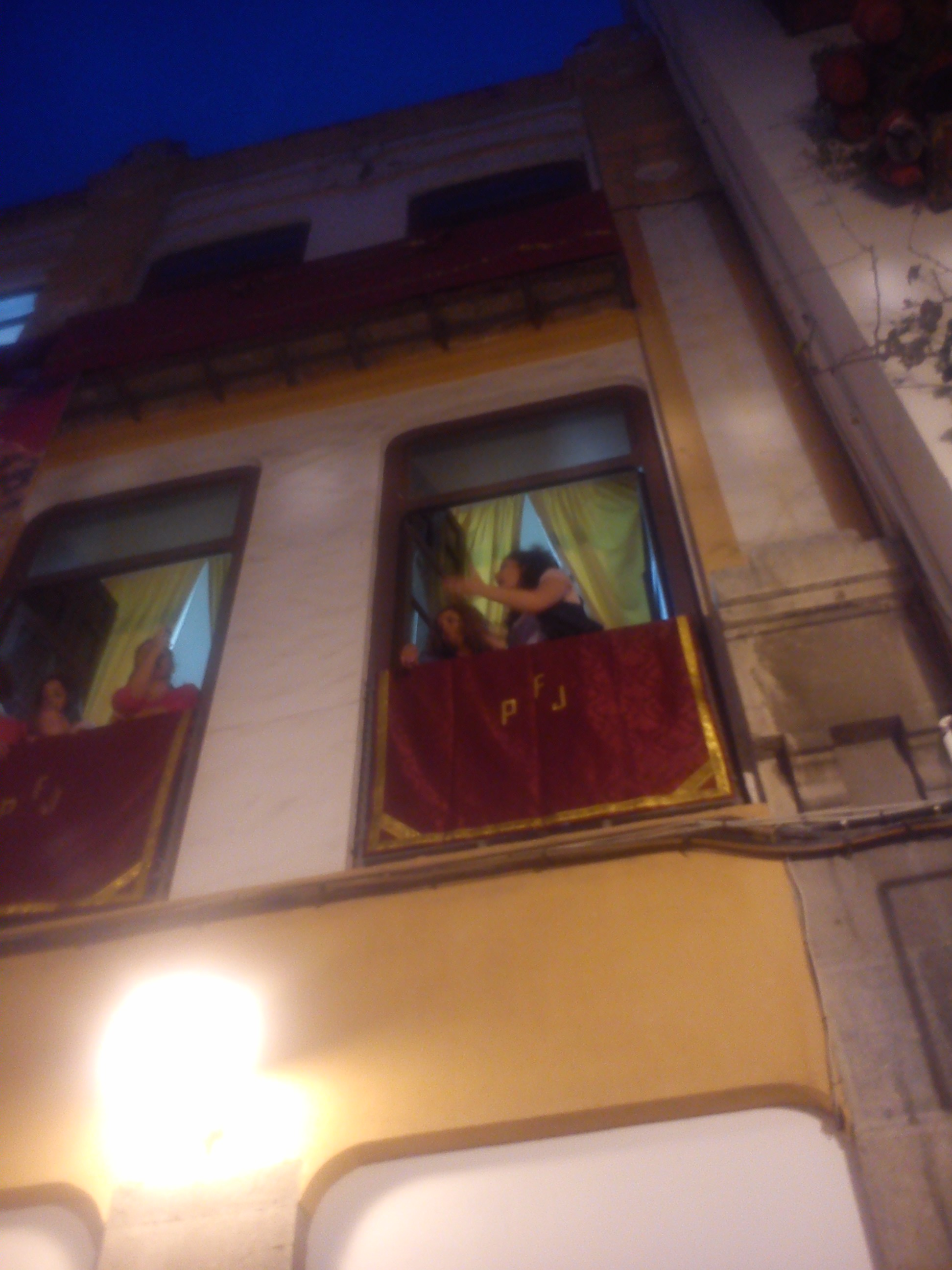 Canto de una Saeta desde el balcón de la Peña Flamenca de Jaén en la Semana Santa de 2014.